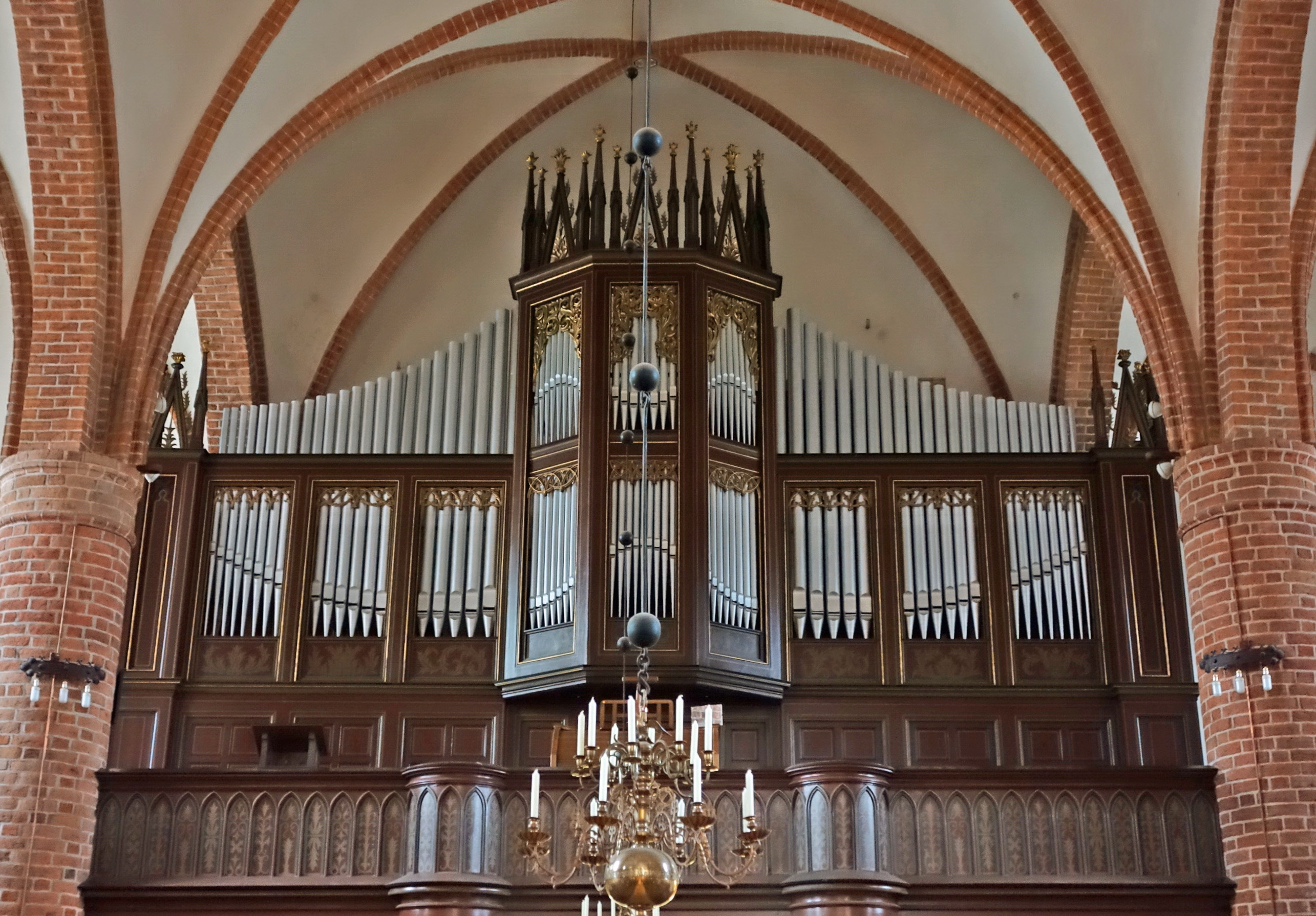 Orgel in Perleberg, Jacobikirche, Brandenburg